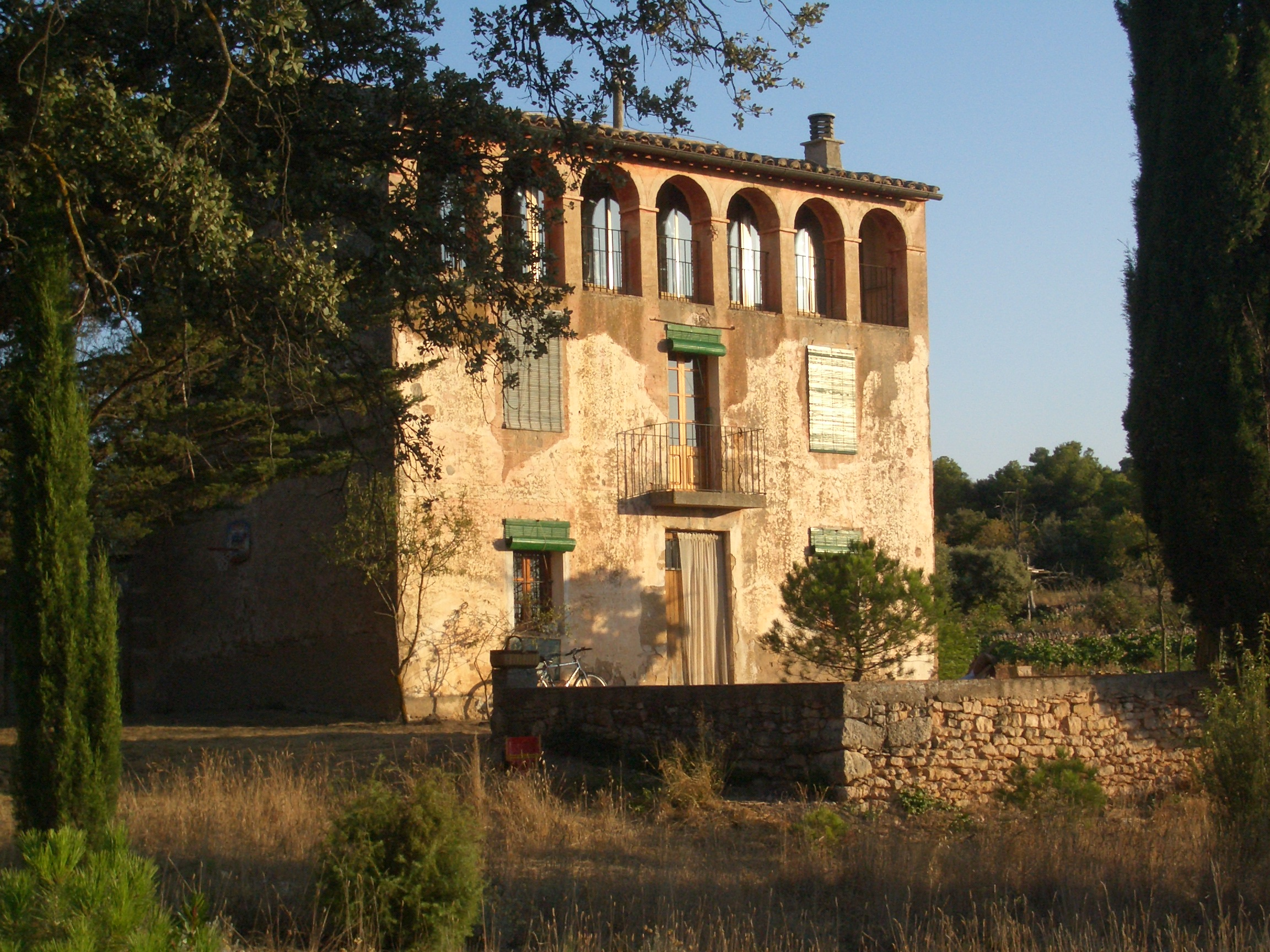 Mas de la Sucarrada, Bellaguarda